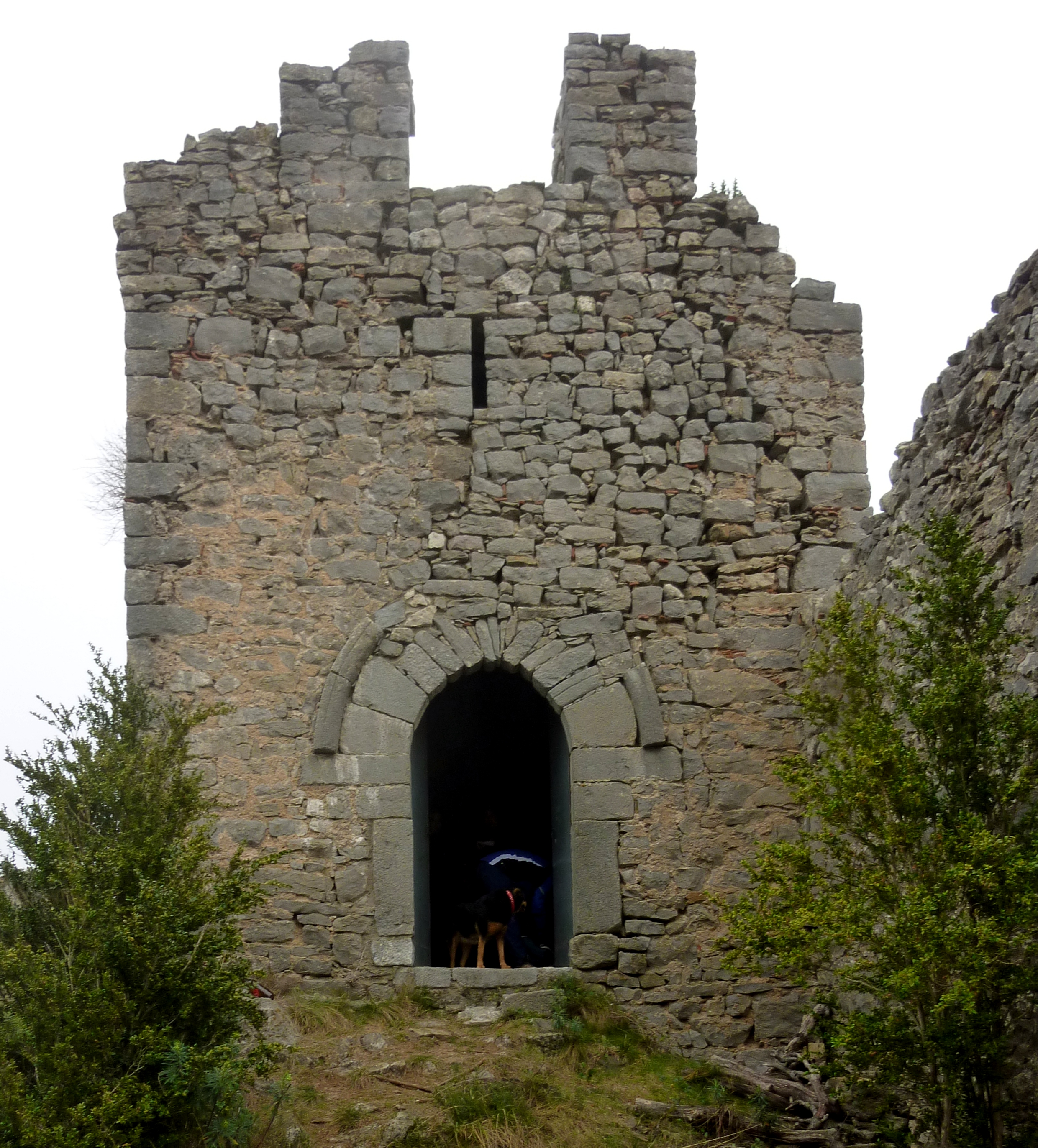 Façana occidental del Sant Joan de Mussols o de Bossols. A la dreta de la imatge s'hi aprecien les restes del mur de la casa de l'ermità.